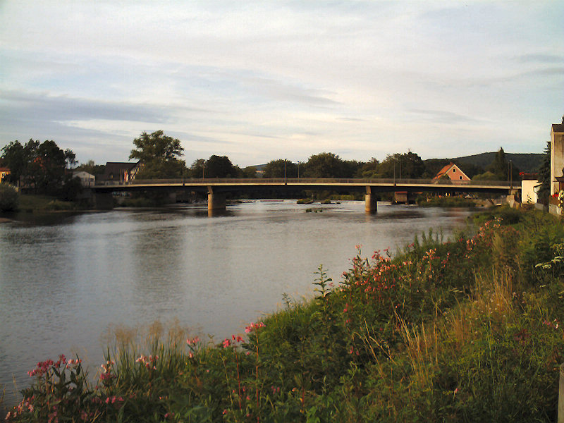 Regen river at Regenstauf